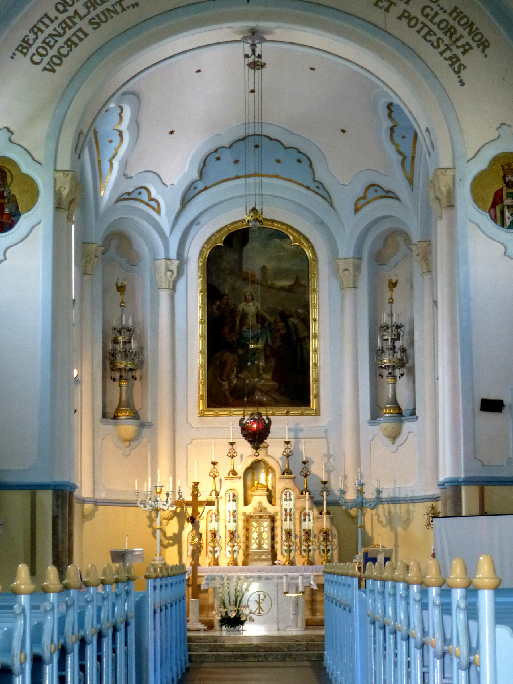 Kostol svätej Alžbety Blue Church Bratislava Slovakia